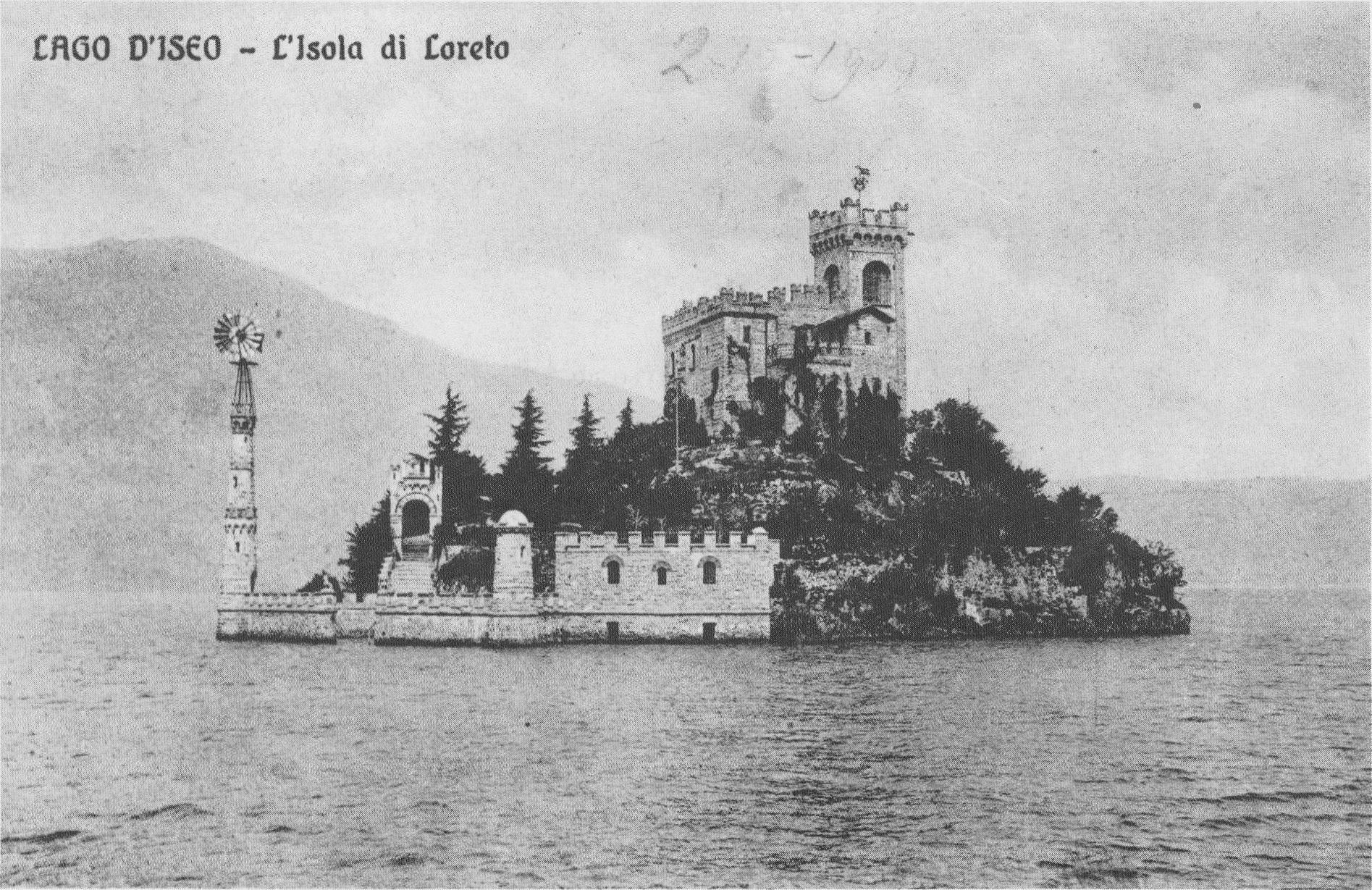 L'isola di Loreto all'inizio del '900